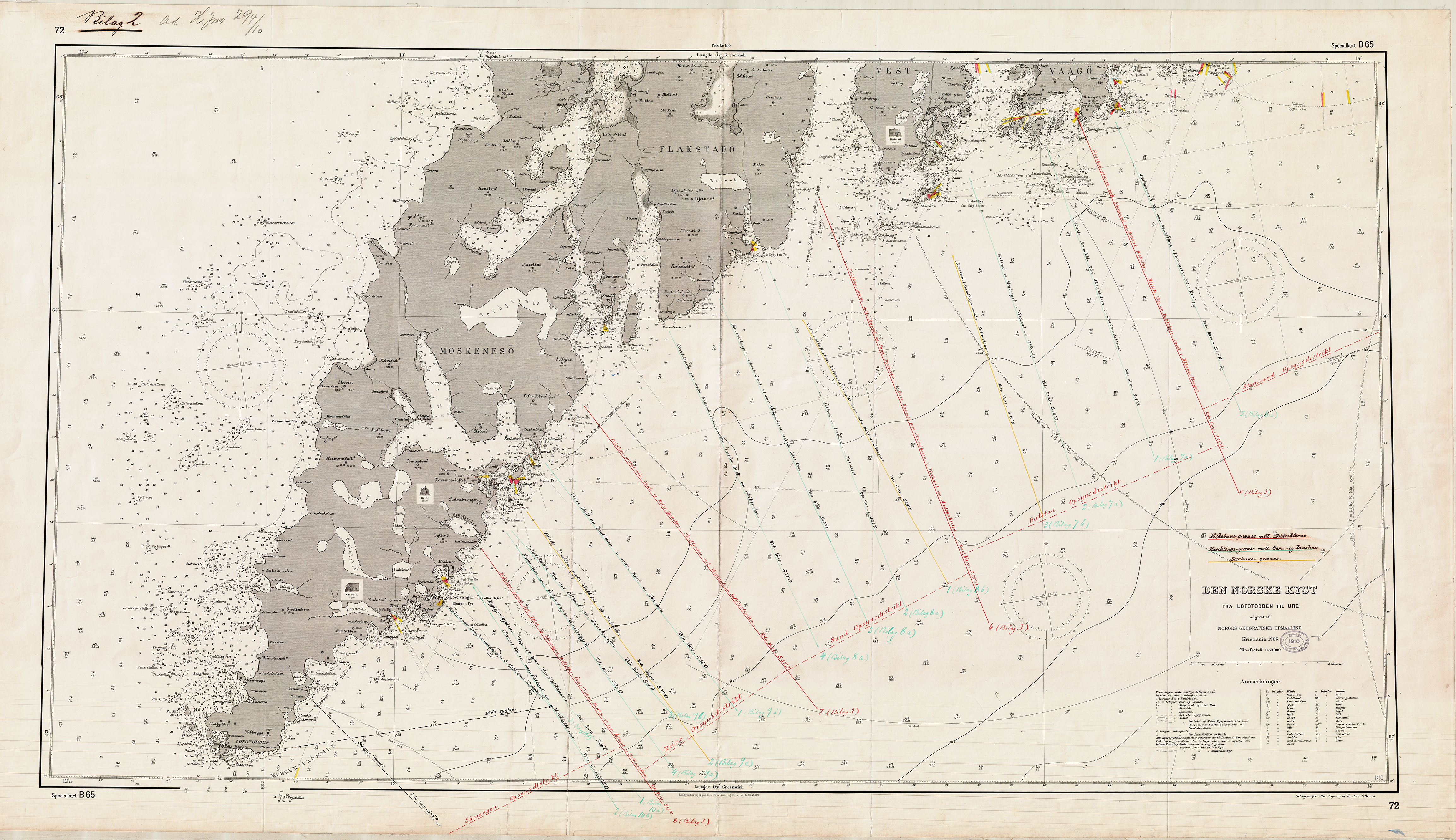 Sjøkart fra 1905 over strekningen mellom Lofotodden og Ure. Tegnet av Kaptein C. Bruun og heliogravert i målestokk 1:50 000. Original kartstørrelse ca 126 cm x 72 cm. Et eksemplar befinner seg hos Statens kartverk Sjø i Stavanger.